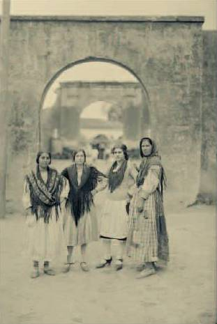 Puerta Nueva a principios del siglo XX. Se ven dos portadas detrás.